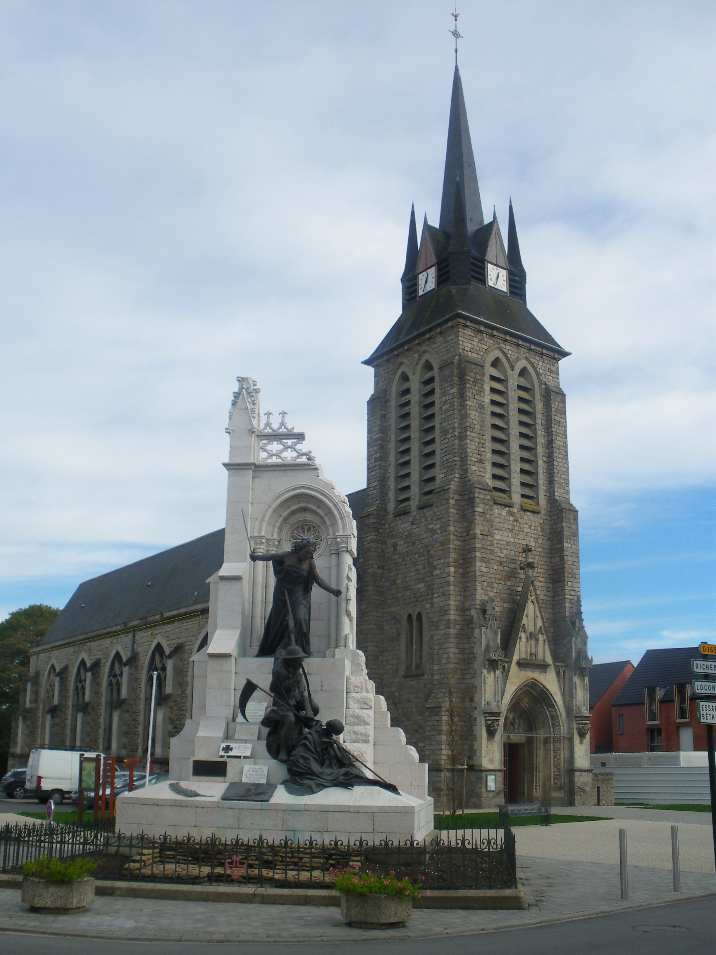 Monument en hommage aux combattants portugais de la Première guerre mondiale, situé à La Couture, plus l'église.